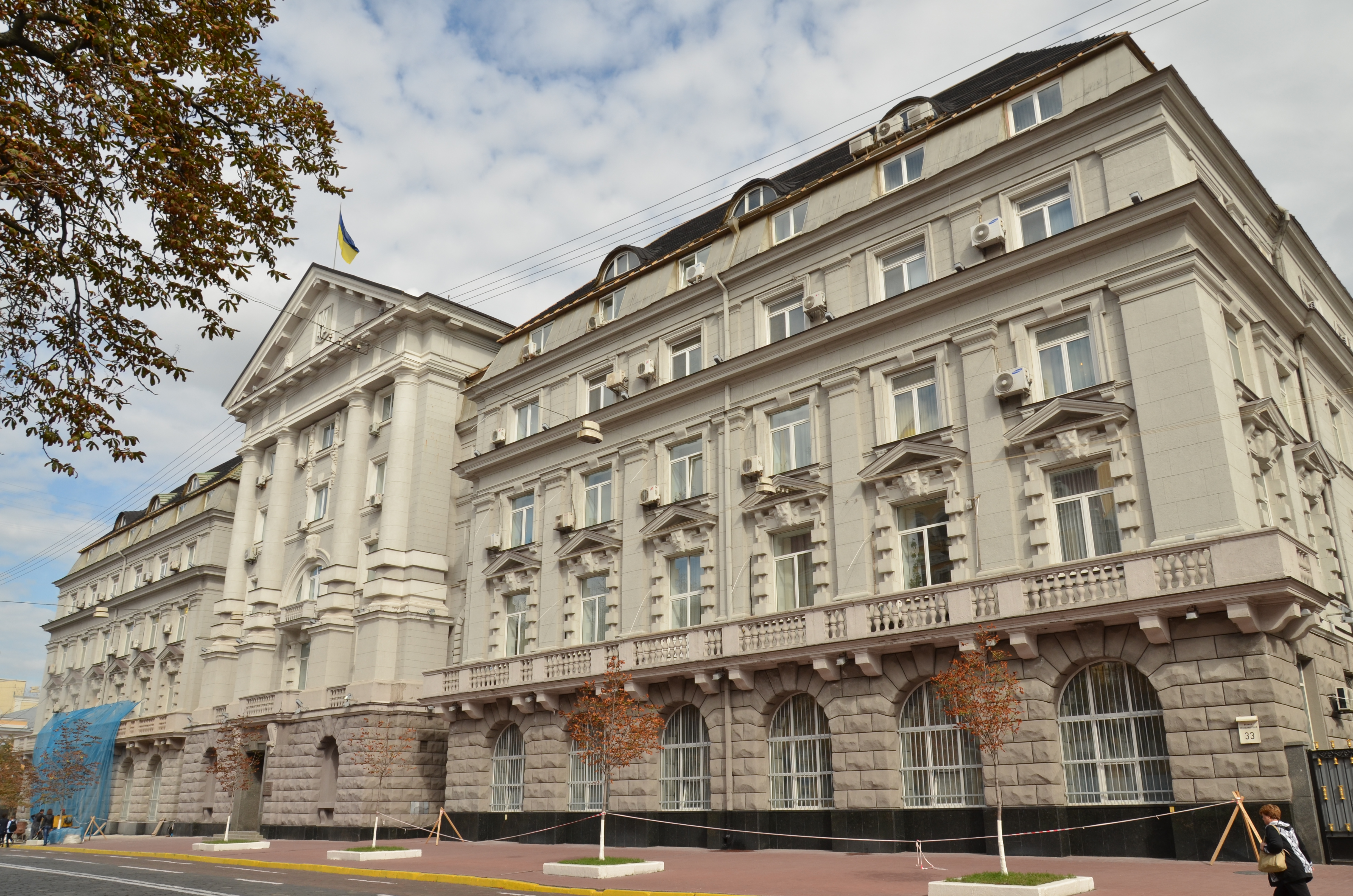 Будинок Губернської Земської управи, Київ, Володимирська вул., 33